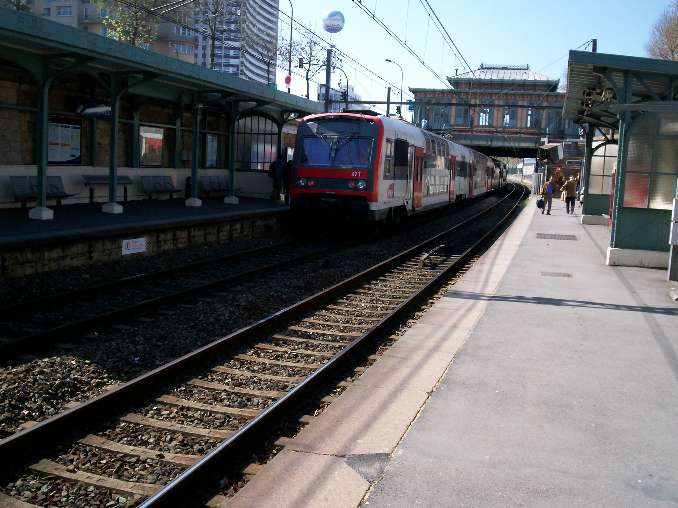 Gare de Javel